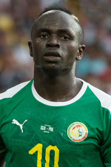 Польша неожиданно проиграла Сенегалу